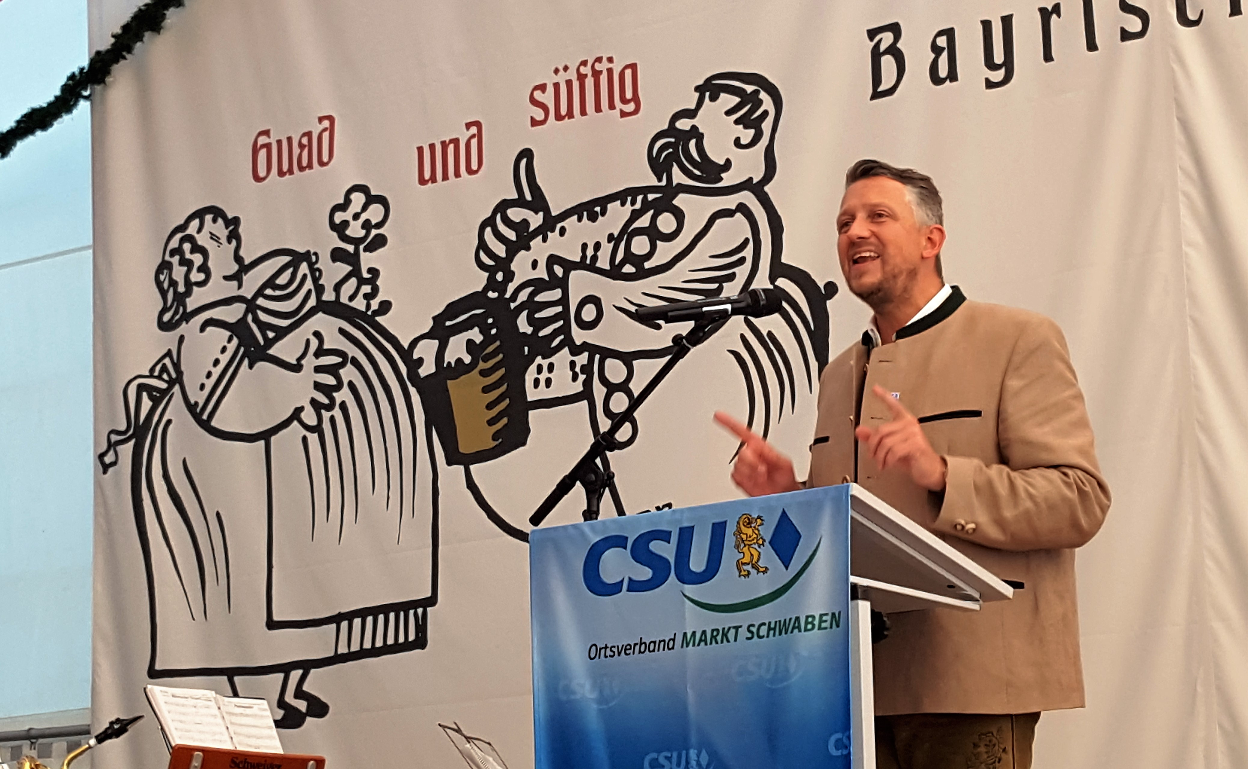 Thomas Huber, MdB, in Markt Schwaben bei einer Bierzeltrede, anläßlich 70 Jahre CSU in Markt Schwaben und 70 Jahre CSU-Kreisverband Ebersberg